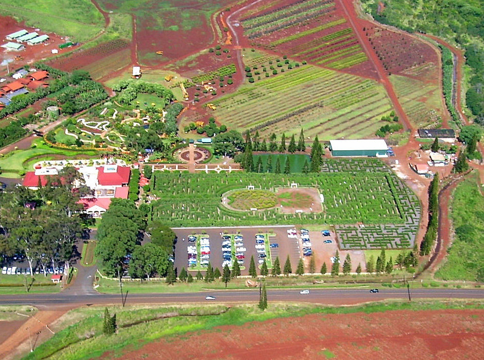 Dole pineapple maze on Oahu